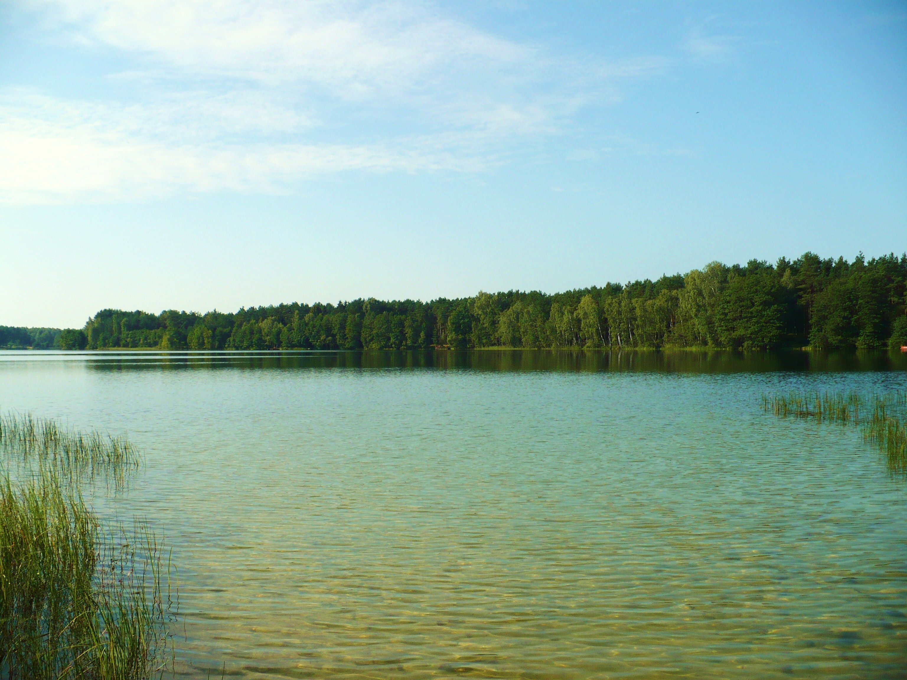 Jezioro Okonińskie